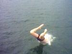 Hovedspring med bøjede ben